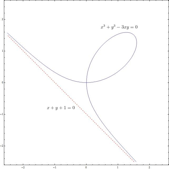 Grafico del "Folium di Cartesio"